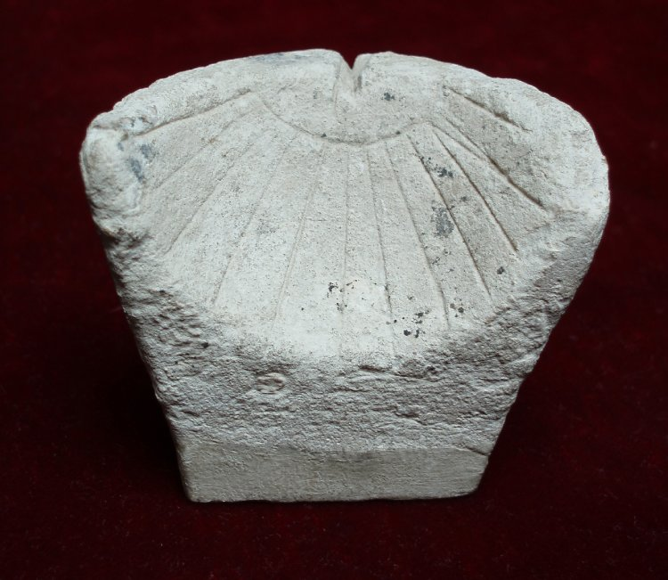 Cadran sphérique miniature (largeur 7,5 cm) de Naucratis.